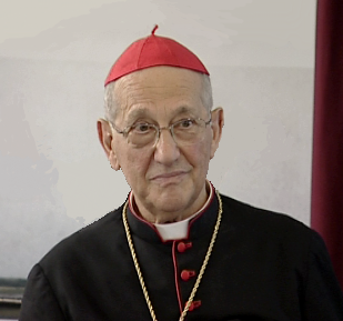 Card. Sergio Sebastiani